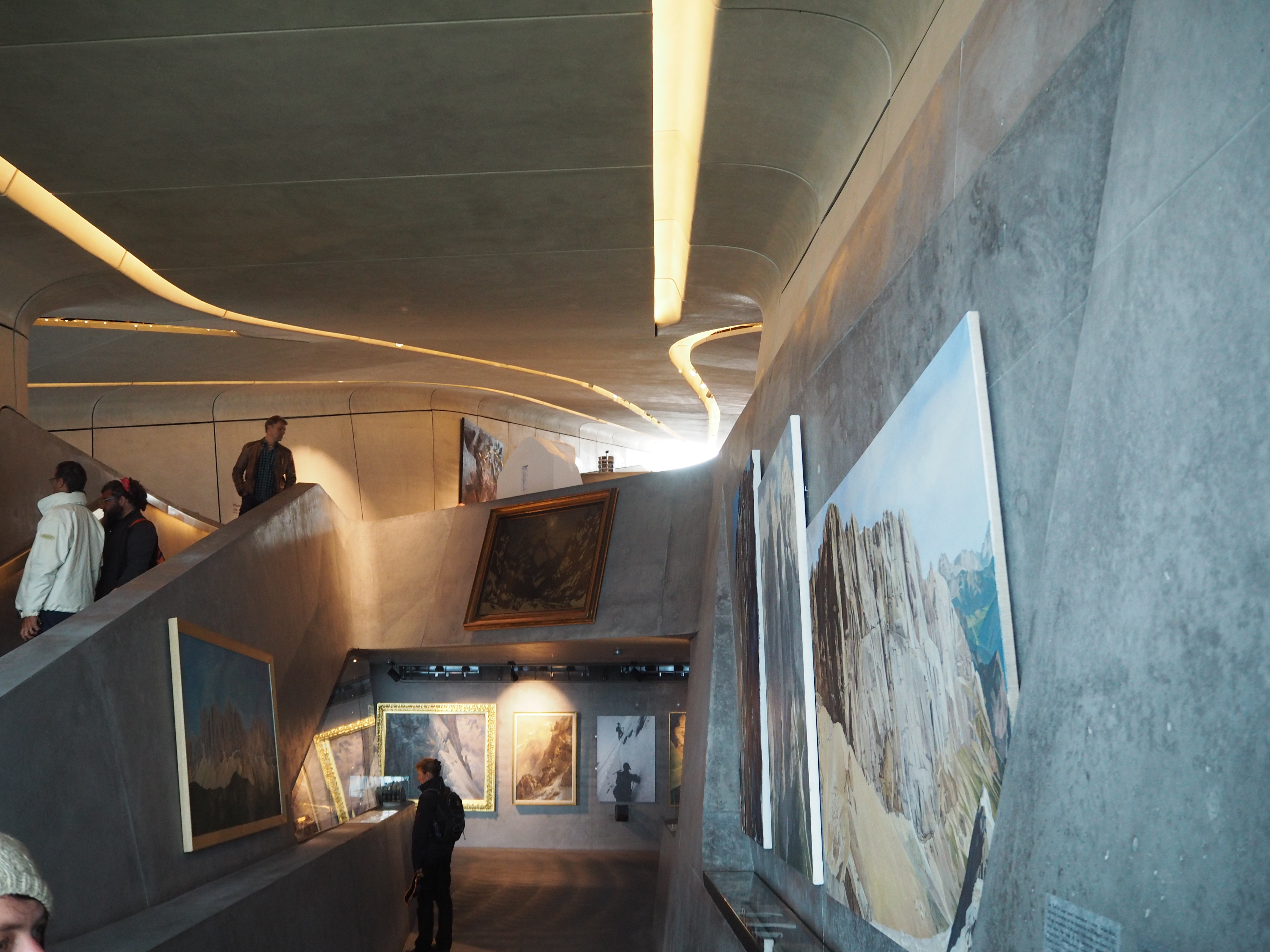 Ausgestellte Berggemälde in der Ausstellung des Messner Mountain Museum Corones